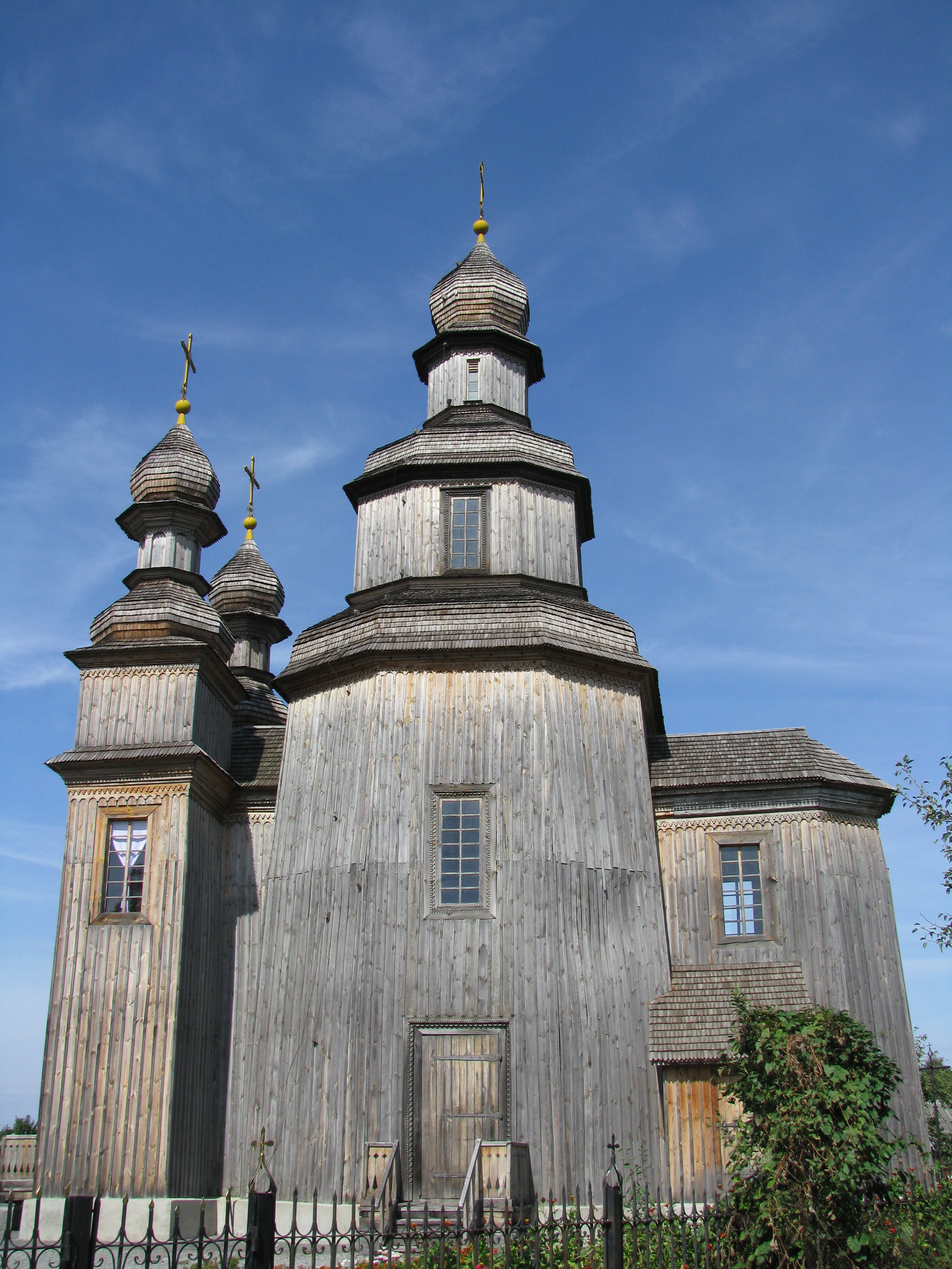 Городище літописного міста Сновська , Седнів